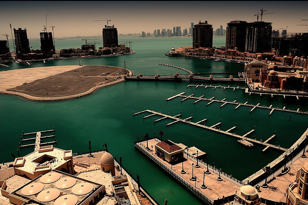 Doha, Qatar